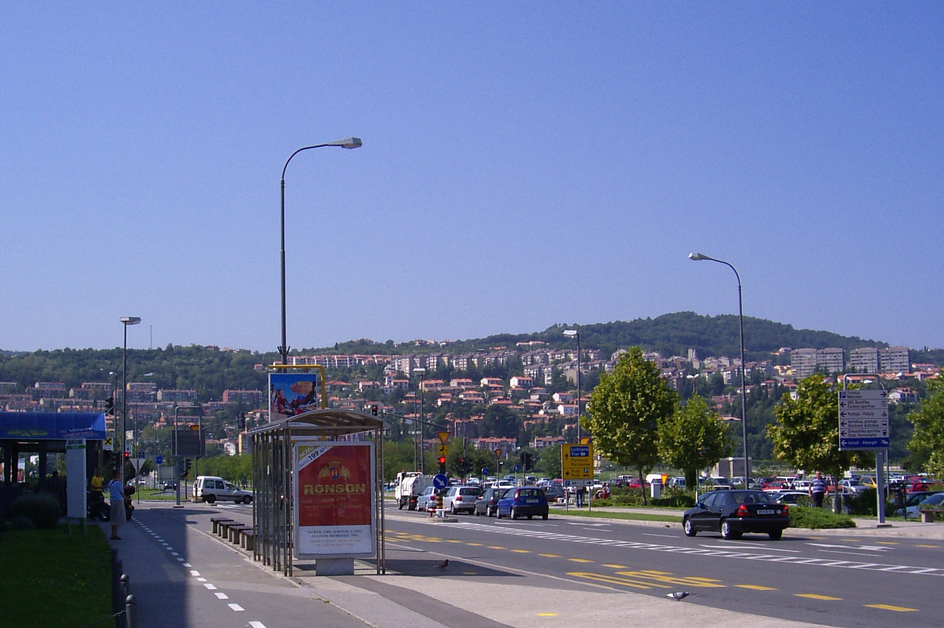 Wohnvierteln außerhalb des Stadtkerns - Residential quarter outside of the old city